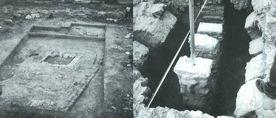 Excavaciones del alfar romano de La Maja en los años 90.